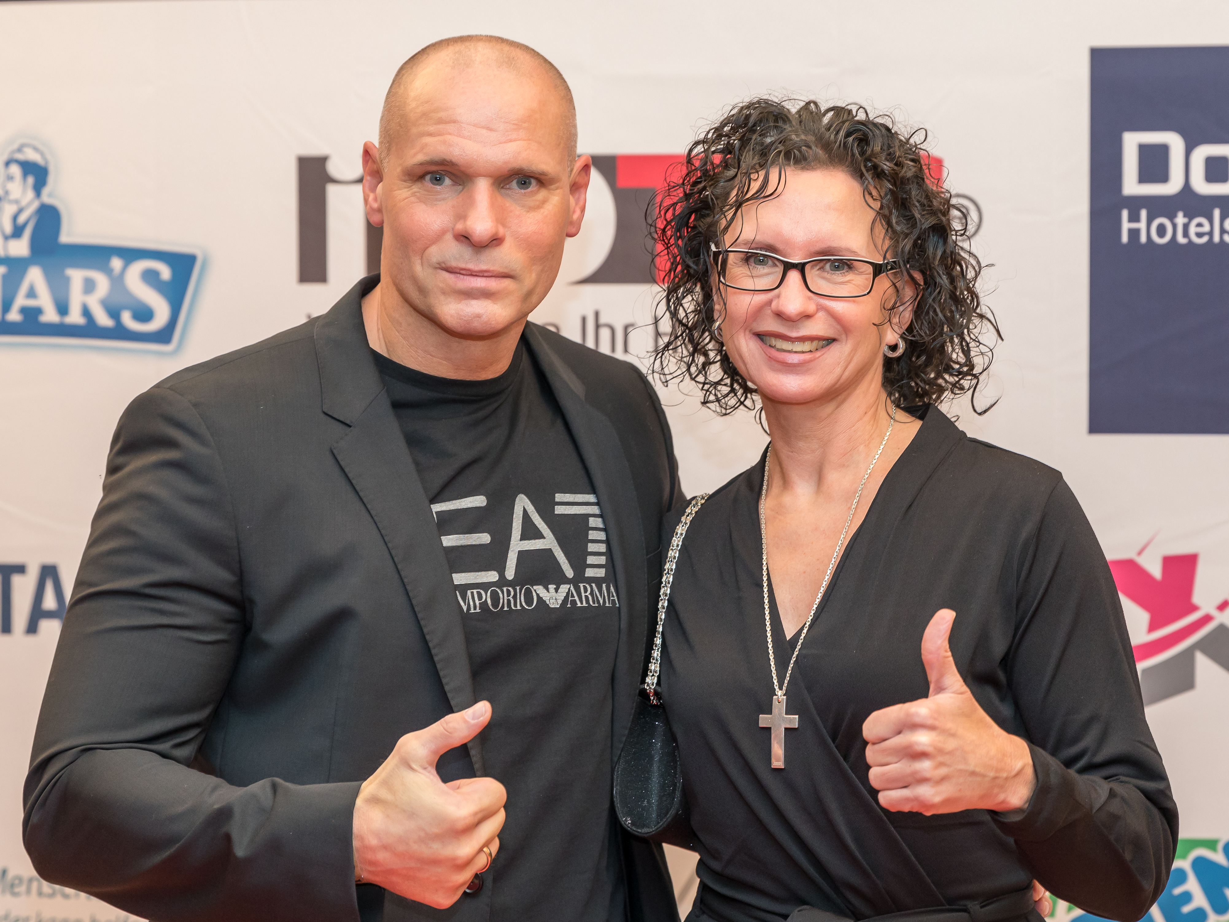 Dorint Charity Sports Night 2018 - Thorsten Legat, ehemaliger deutscher Fußballspieler und heutiger Fußballtrainer, mit seiner Ehefrau Alexandra Legat